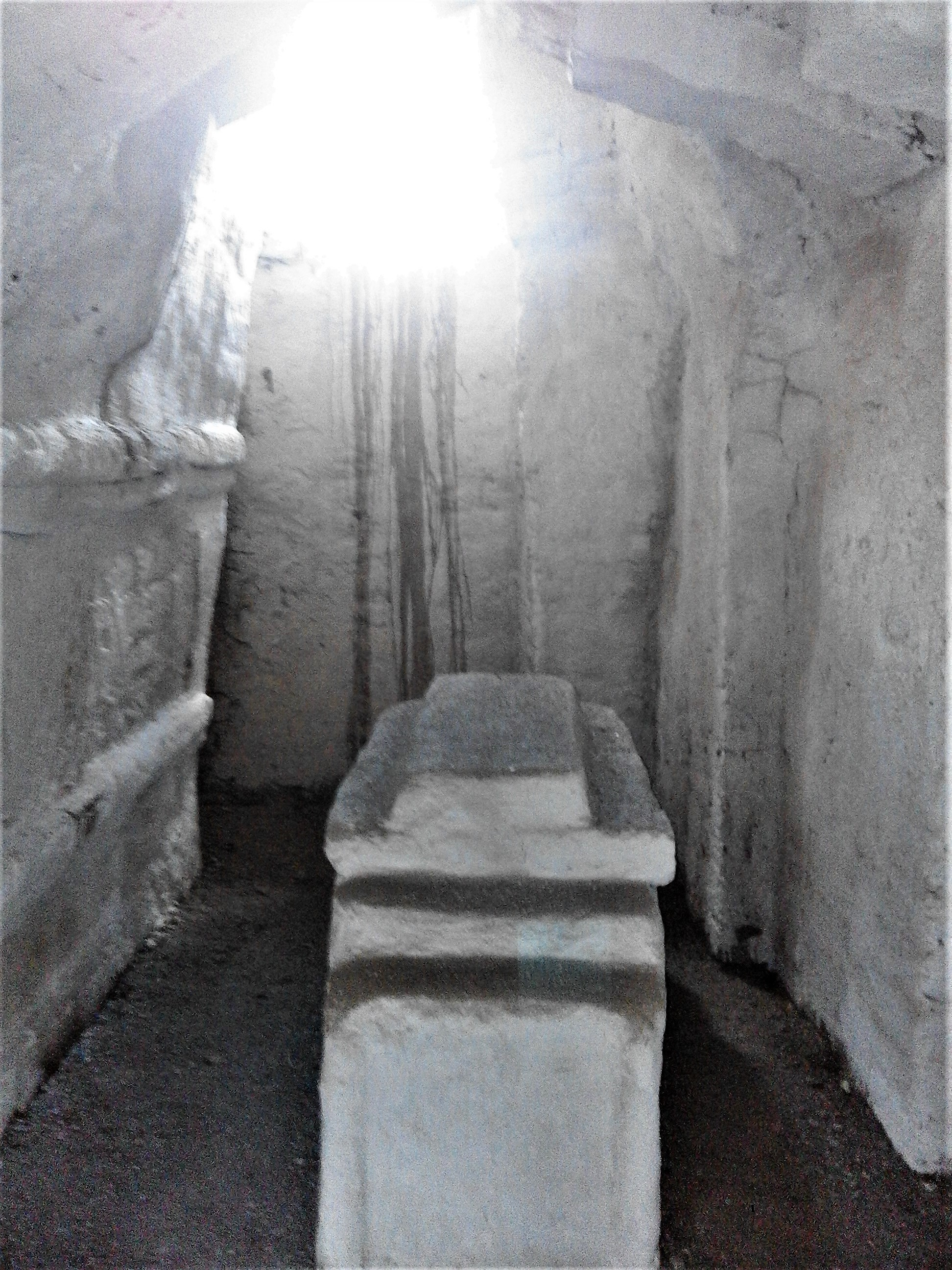 Мавзолей волостного управителя Нурлана Байсеитова, внутри